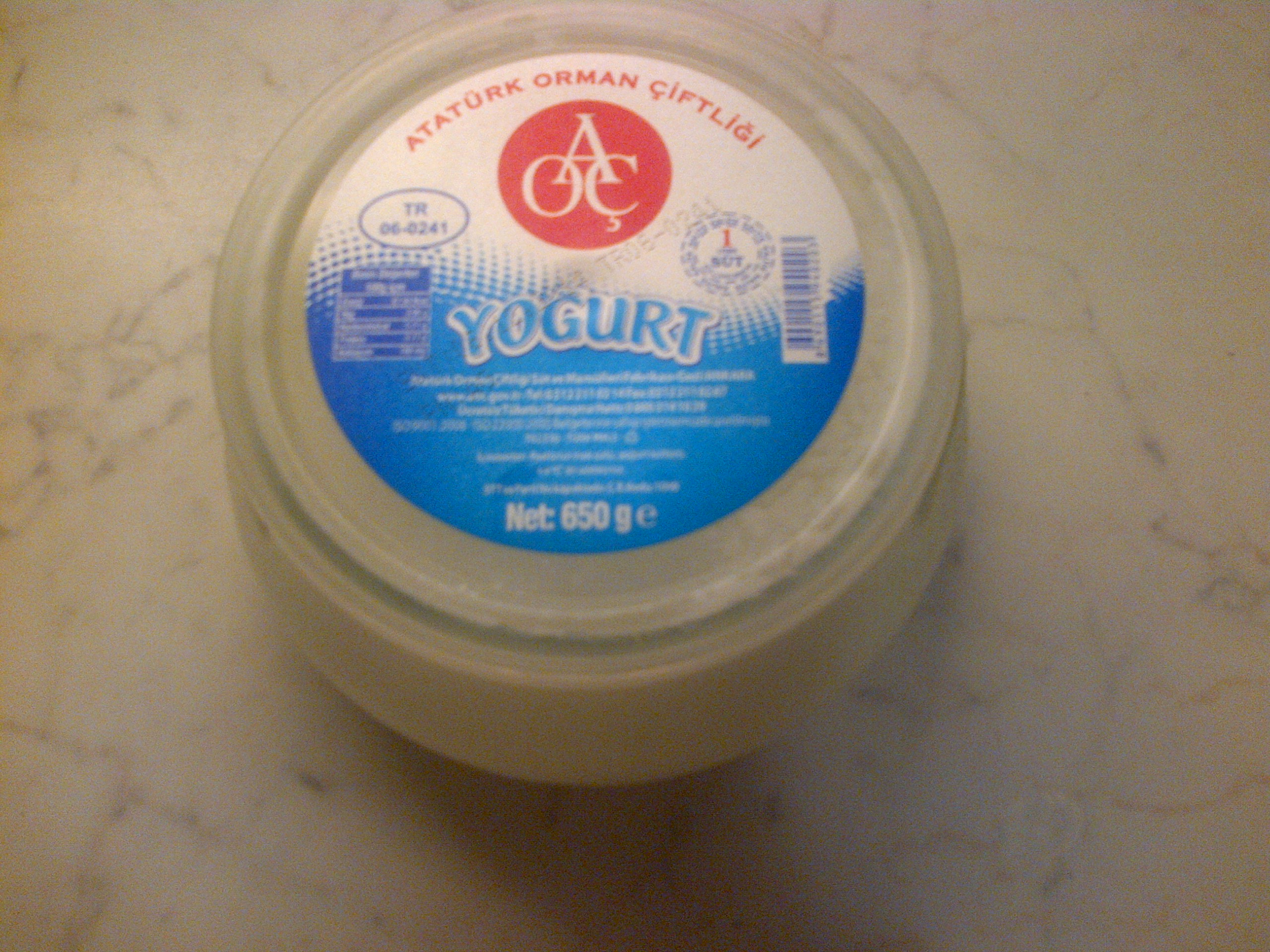 Yoğurt from the "Atatürk Orman Çiftliği" establishments, originally placed at the Atatürk Forest Ranch, in Ankara.